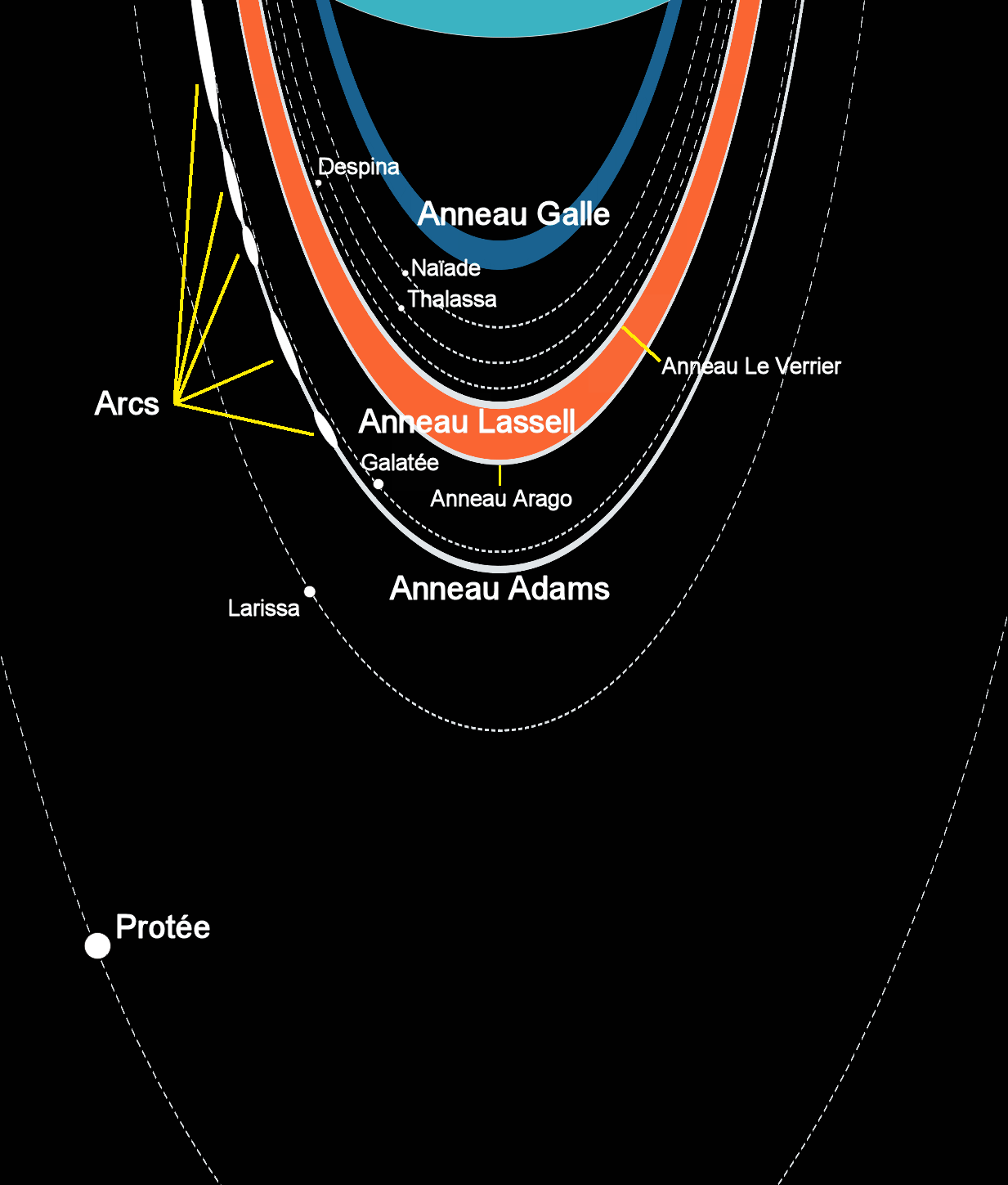 Structure du système d'anneaux et de lunes de Neptune. Les proportions sont respectées.